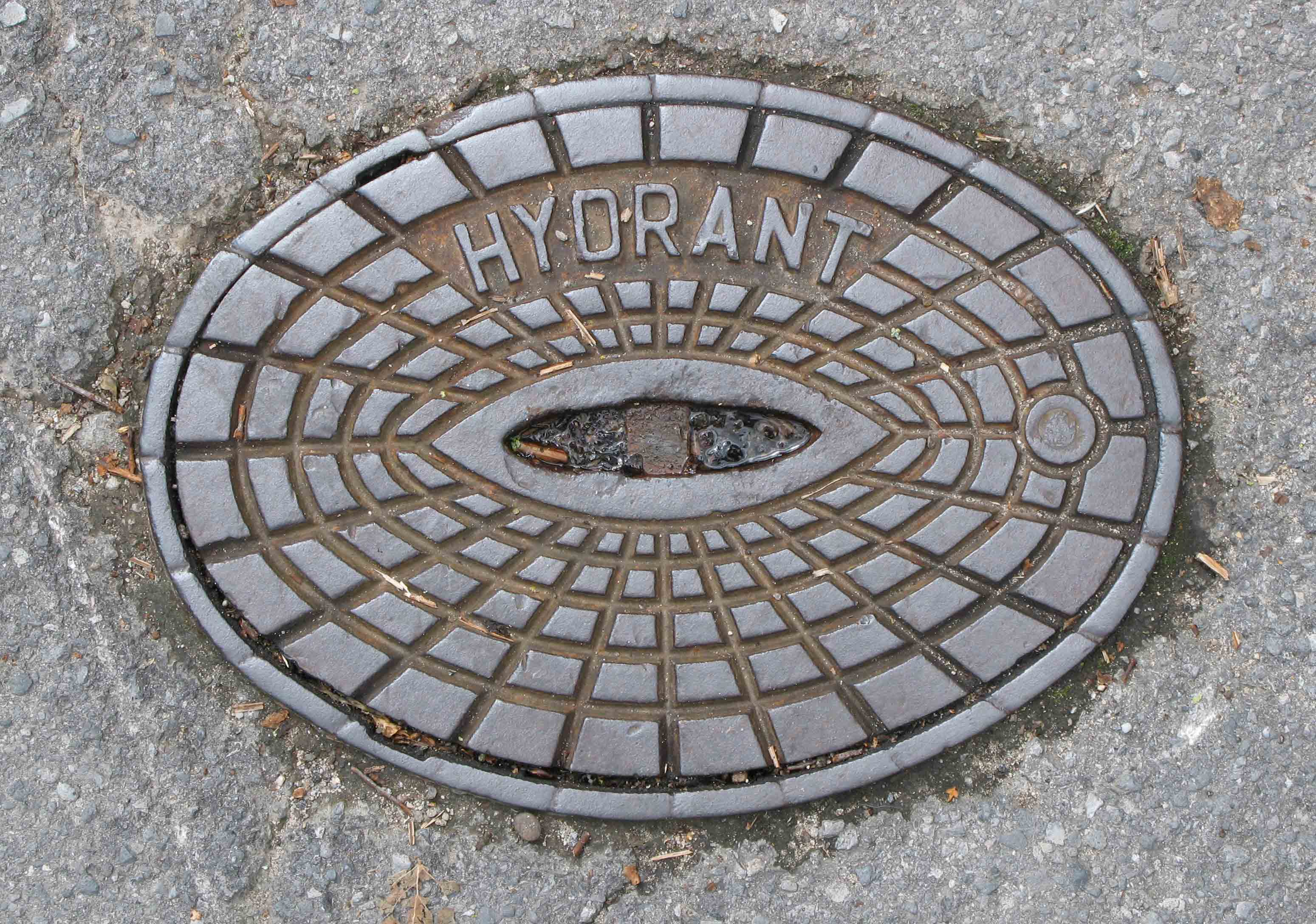 Nidderflurhydrantendeckel.